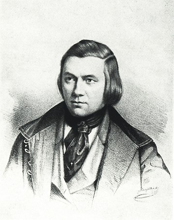 Erzähler Hermann Kurz (1813-1873)